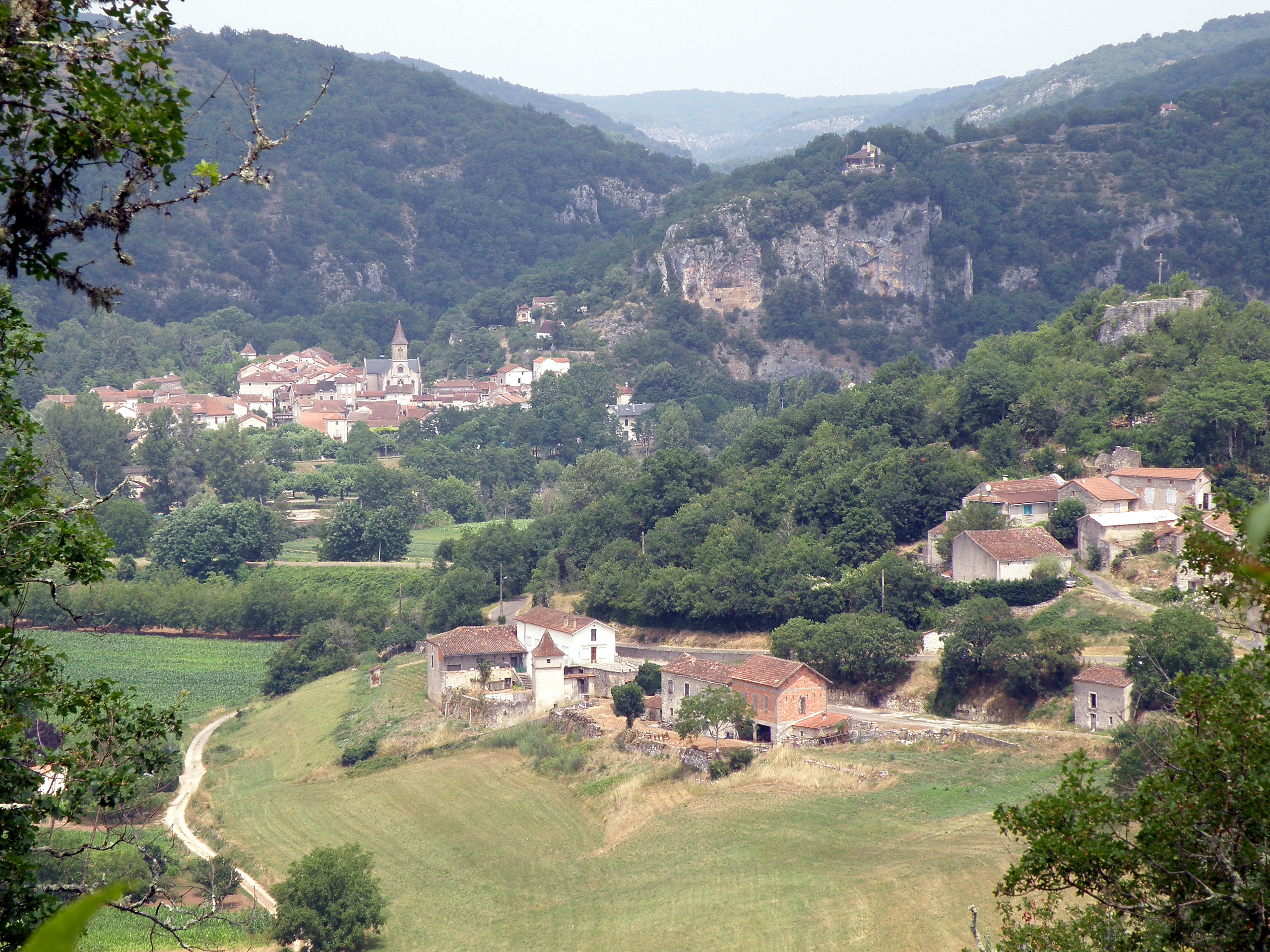 Arcambal, commune et village du département du Lot (région Midi-Pyrénées, France), situé sur la rive gauche (c'est-à-dire sud) de la rivière Lot, env. 5 km (à vol d’oiseau) à l’est de Cahors. Hameau de Béars, situé dans un lobe de méandre du Lot, dans le nord de la commune. On aperçoit : à l’avant-plan, hameau de Béars, avec, près du bord droit de la photo, le château ruiné coiffant une butte et surmonté d'une croix ; au fond à gauche (église), le village de Vers, sur la rive opposée (c'est-à-dire droite) de la rivière.